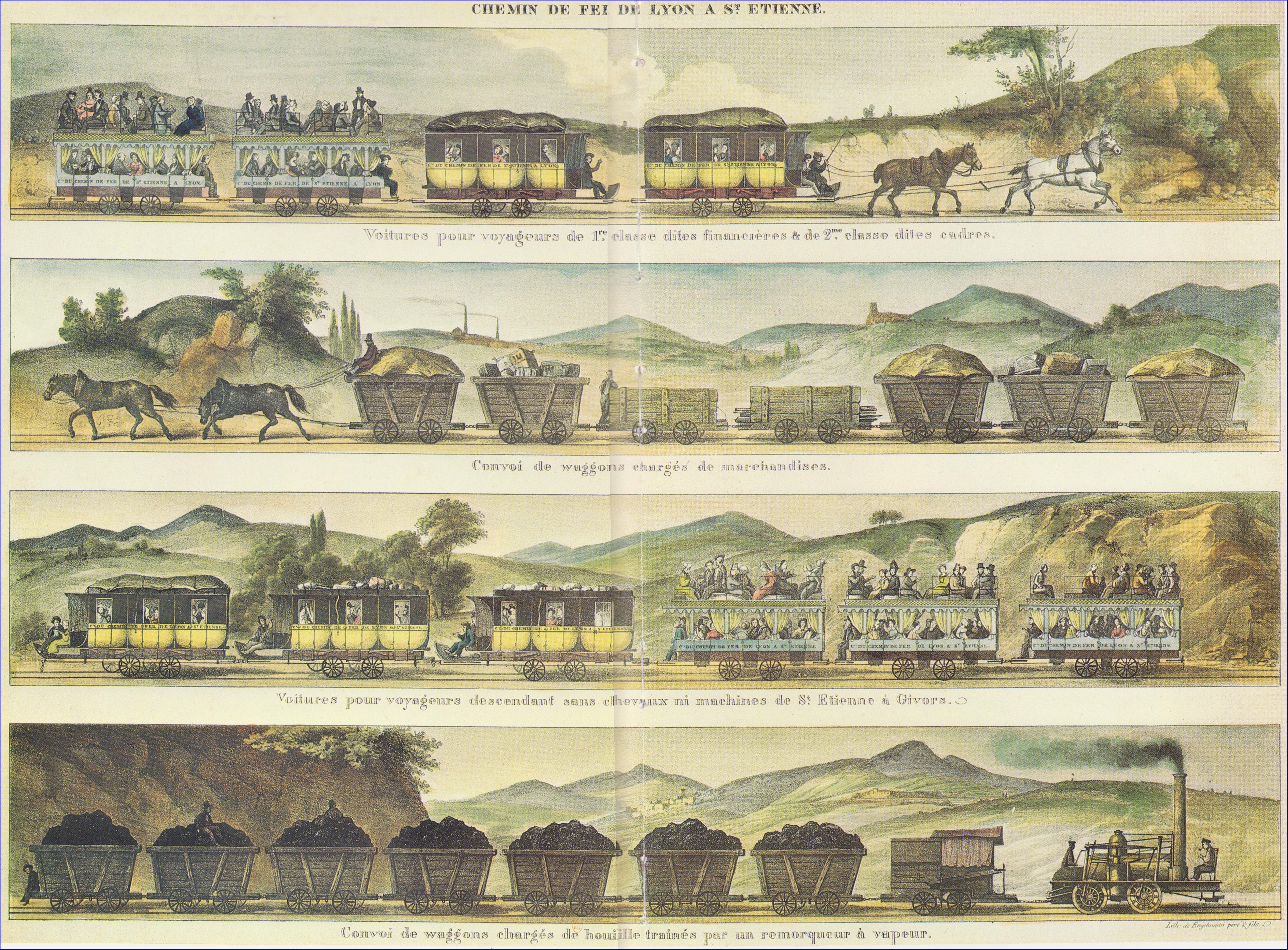 lithographie